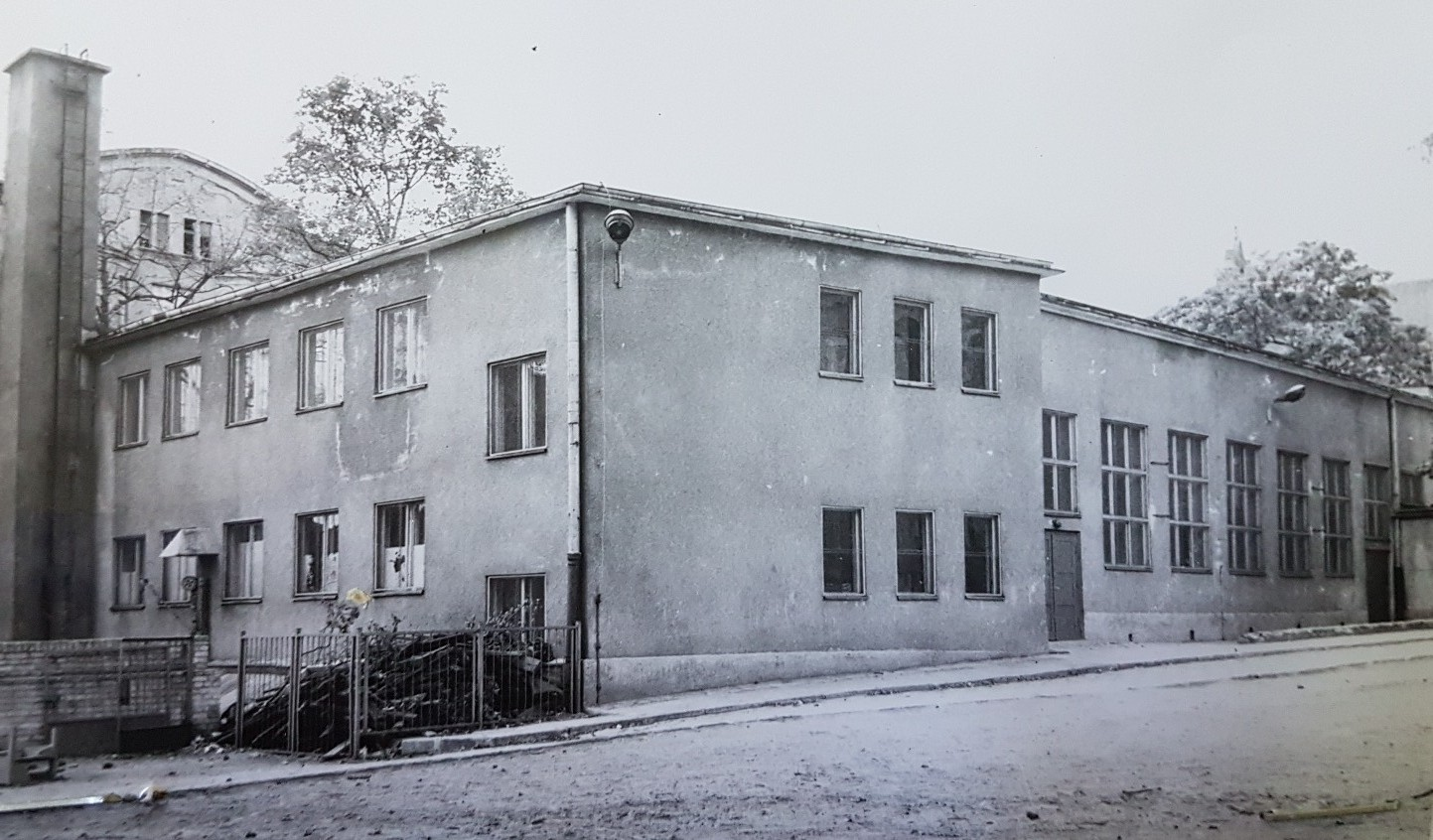 Stargard Szczeciński, 1977r. Sala gimnastyczna Szkoły Podstawowej nr 1 przy ul. Popiela